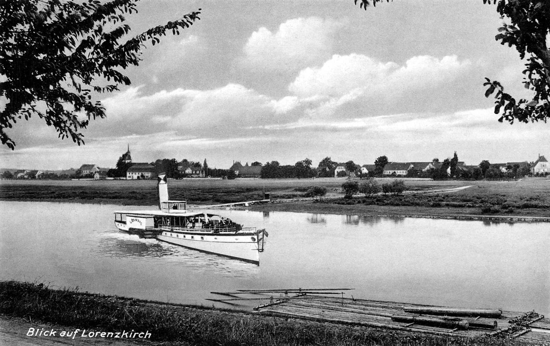 Die Postkarte wurde von der Schiffsanlegestelle in Strehla in Sachsen, Deutschland, aus aufgenommen. Sie zeigt einen im 19. Jahrhundert gebauten Raddampfer, der begonnen hatte, an der Schiffsanlegestelle von Strehla am Ufer der Elbe anzulegen. Im Hintergrund sieht man den Ort Lorenzkirch. Der Ort Lorenzkirch hatte ab 1791 als Marktflecken mit seinen 1834 neu bestätigten Marktrechten eine große wirtschaftliche Bedeutung wegen des Lorenzmarktes, der Pferdezüchter, Viehzüchter, Händler und Handwerker aus weitem Umkreis anzog. Dort auf dem Lorenzmarkt wurde diese Postkarte zum Verkauf angeboten. In der Gegenwart wird der Lorenzmarkt als mehrtägiges Volksfest mit einem eintägigen Verkaufsmarkt begangen.